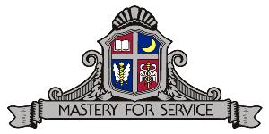 関西学院エンブレム